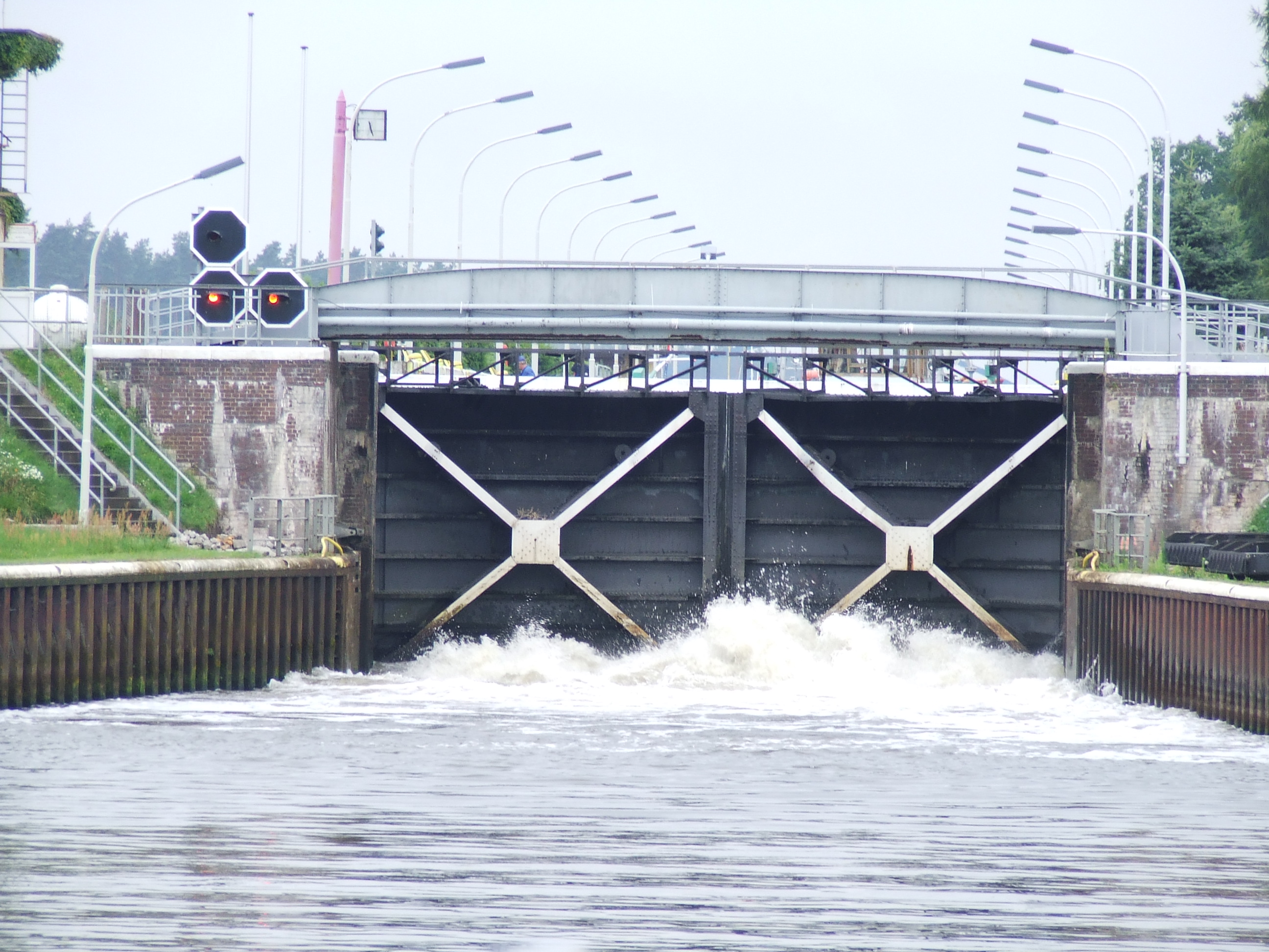 Das Unterhaupt der alten Schleuse Wusterwitz (Nordkammer) im Elbe-Havel-Kanal